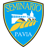 Emblema del Seminario Vescovile di Pavia